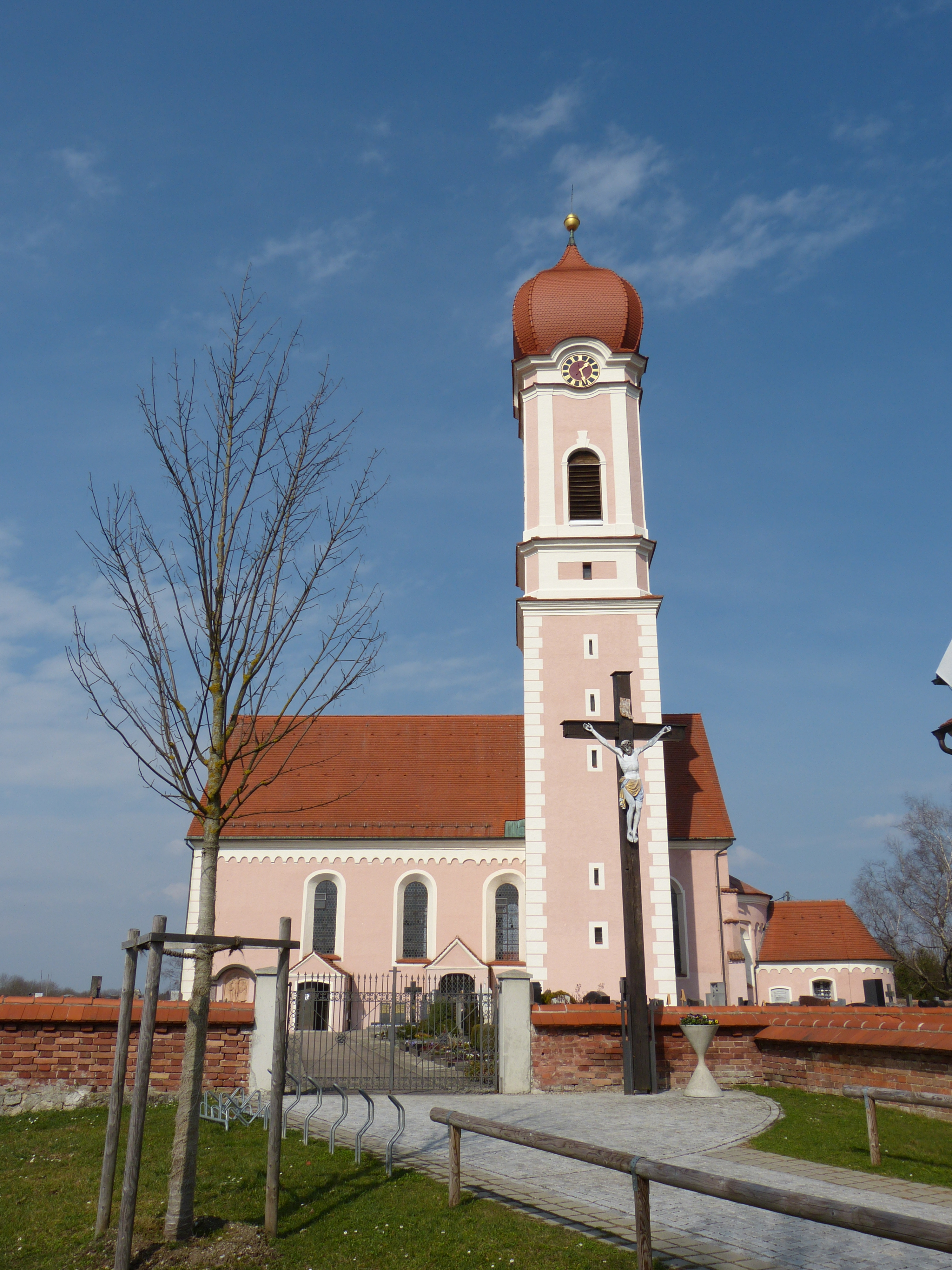 St. Martin, Gemeinde Heimertingen, Landkreis Unterallgäu, Bayern